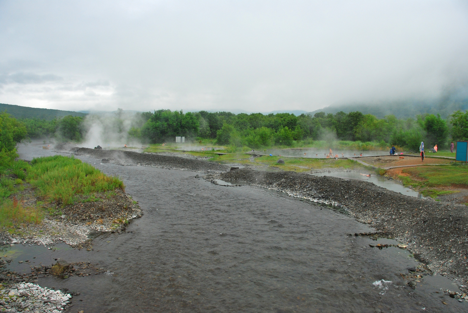 Малкинское месторождение минеральных вод, This image is related to the protected area of Russia number 4100002